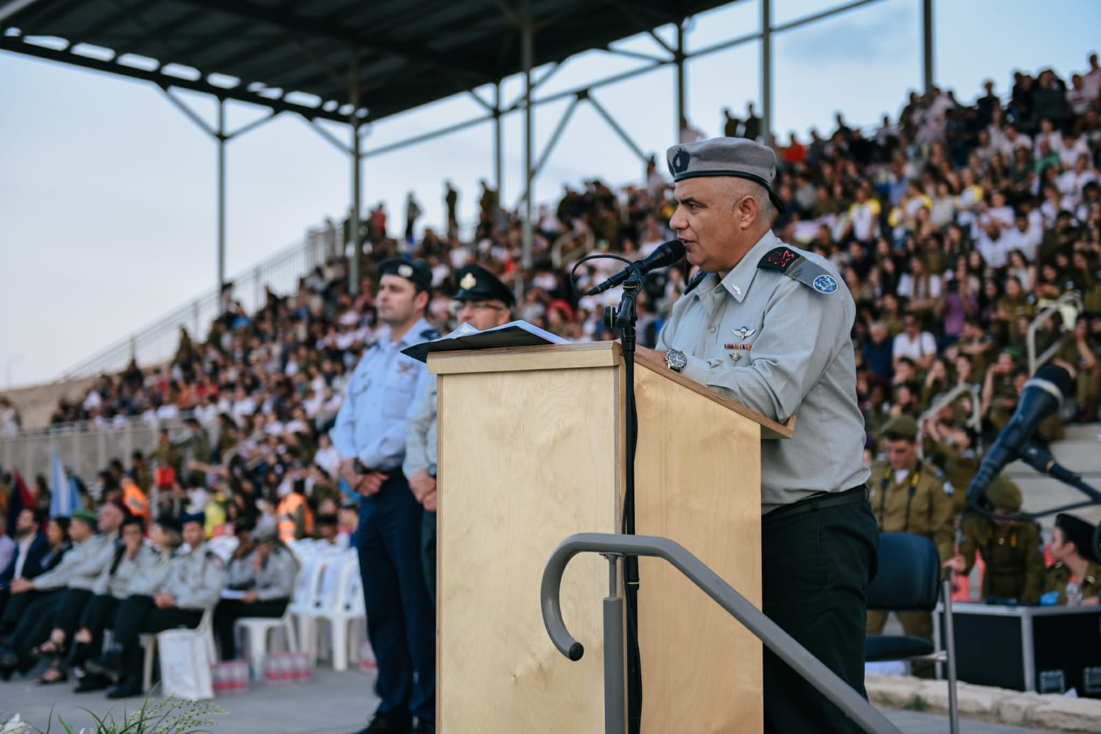 טקס סיום קורס קצינים אחוד לכלל חילות אכ"א - חיל משאבי האנוש, חיל המשטרה הצבאית וחיל החינוך והנוער. הטקס נערך בראשות ראש אכ"א בקריית הדרכה שבנגב.